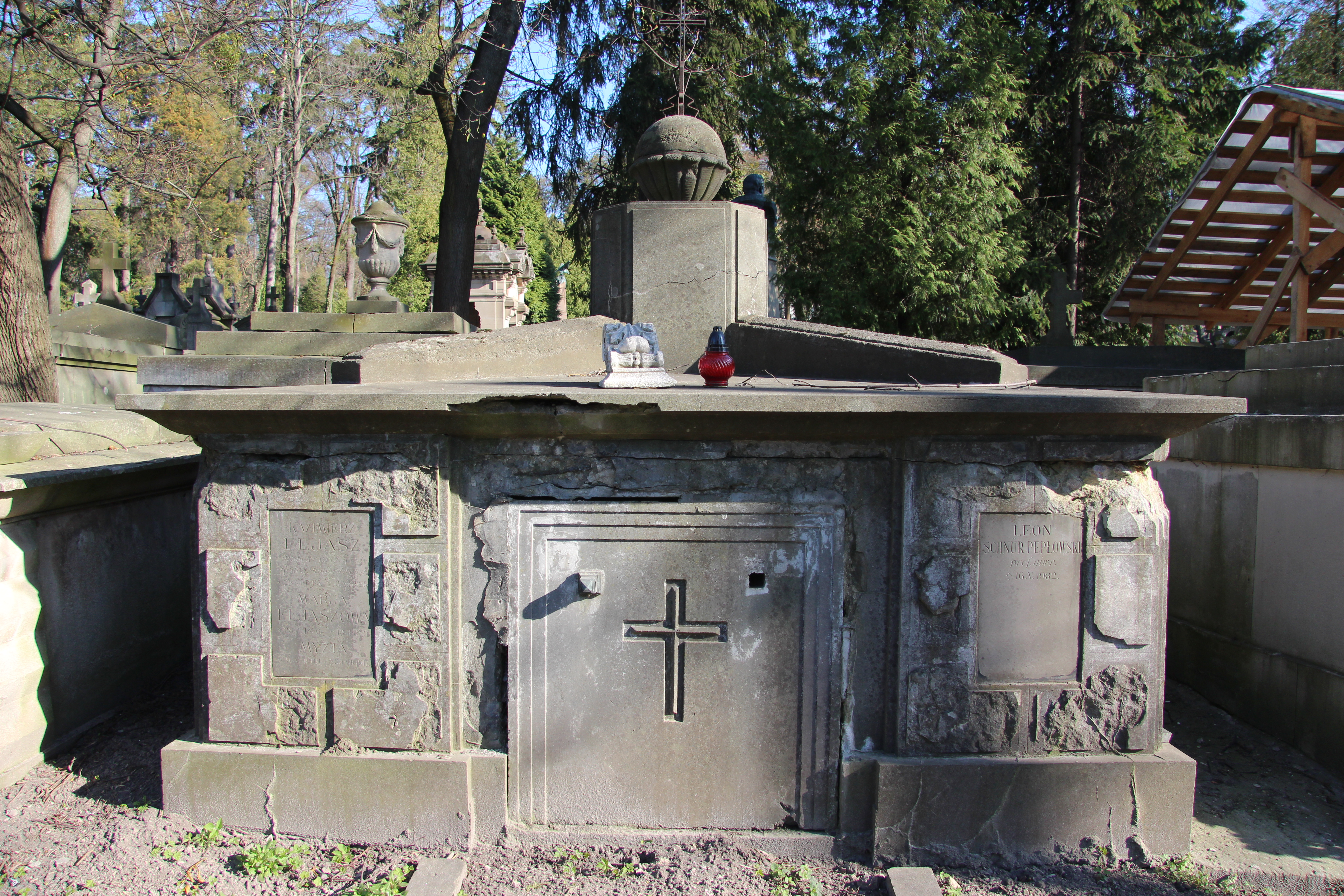 Grobowiec Schnür-Pepłowskich i Eliaszów (Kazimierz Eliasz)